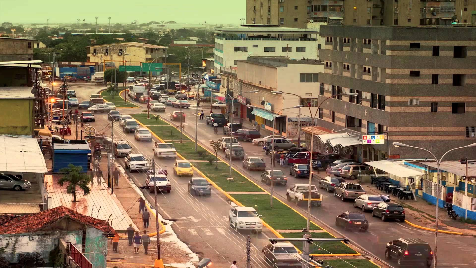 Av. Romulo Gallegos Valle de la Pascua